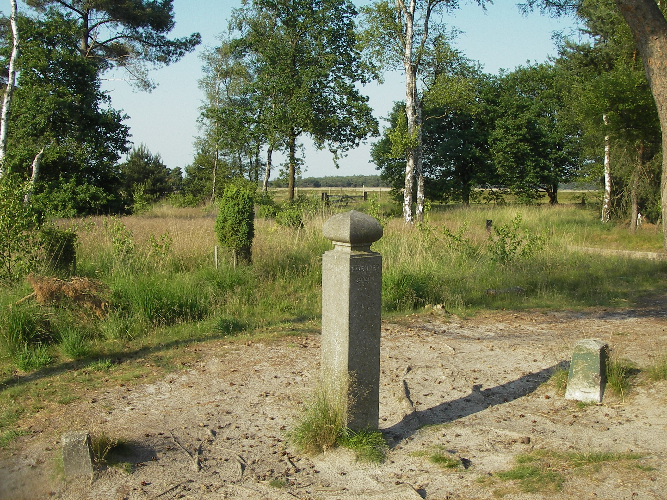 De Hoenderboompaal, een oude grenspaal op de strabrechtse heide.